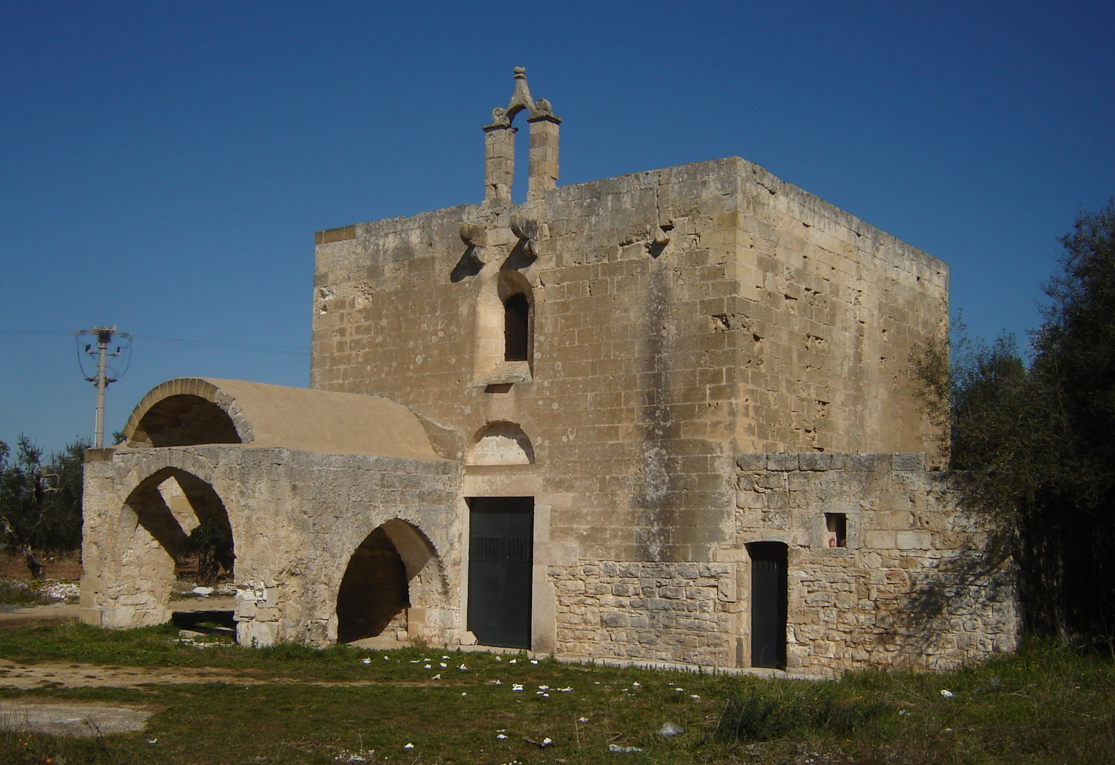 L'edificio immortalato in foto è la Chiesa rurale dell'Annunziata; un'antica chiesa sita nei pressi della provinciale Bitonto-Aeroporto di Palese, al confine tra il comune di Bari e quello di Bitonto. Ho scattato io stesso questa fotografia con la mia macchina fotografica digitale, la mattina di sabato 25 febbraio 2012 e concedo la foto in licenza libera. Una volta portato il file sul mio pc, ho ritagliato un po' i bordi con il programma Microsoft Office Picture Manager. L'edificio in questione é ora di proprietà del comune di Bitonto.